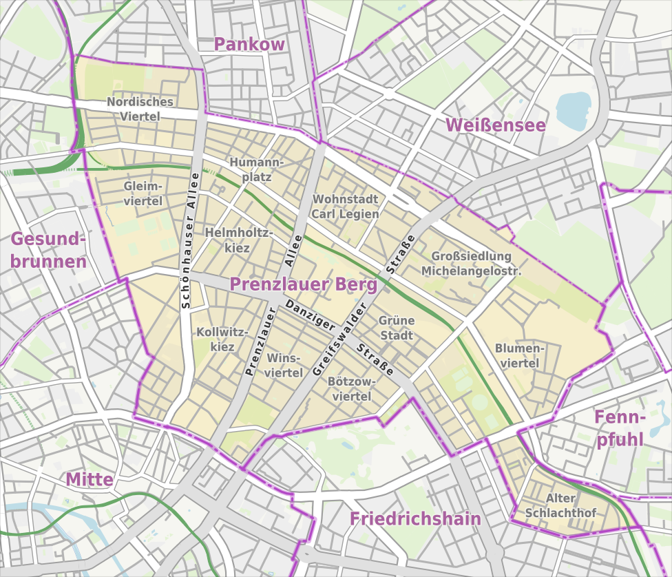 Übersichtskarte der Straßen und Ortslagen in Berlin-Prenzlauer Berg